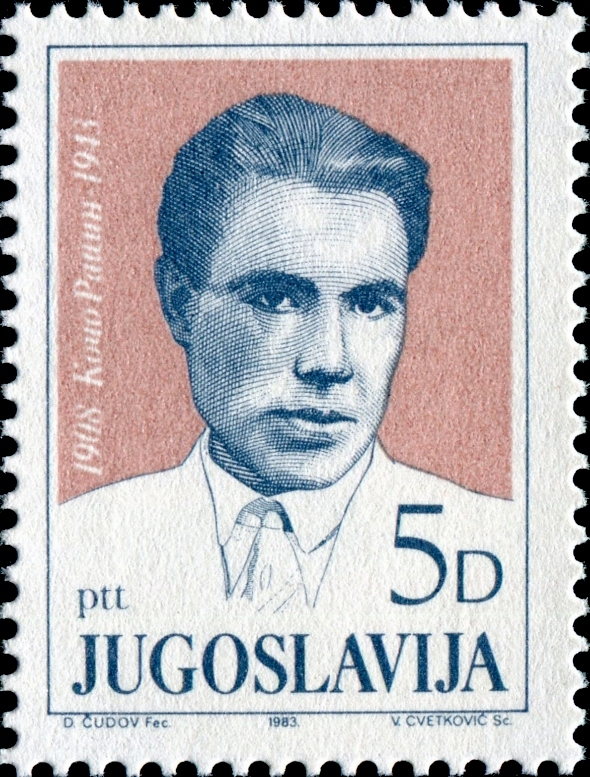 Kočo Racin